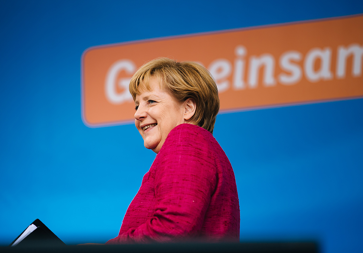 Bundeskanzlerin Dr. Angela Merkel bei einer CDU Veranstaltung zur Bundestagswahl 2013 in Seligenstadt (Hessen).